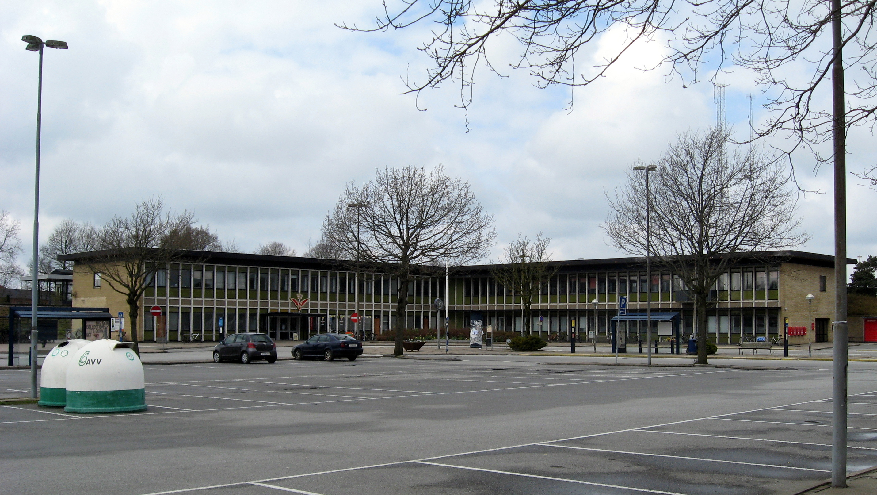 Banegården i Brønderslev